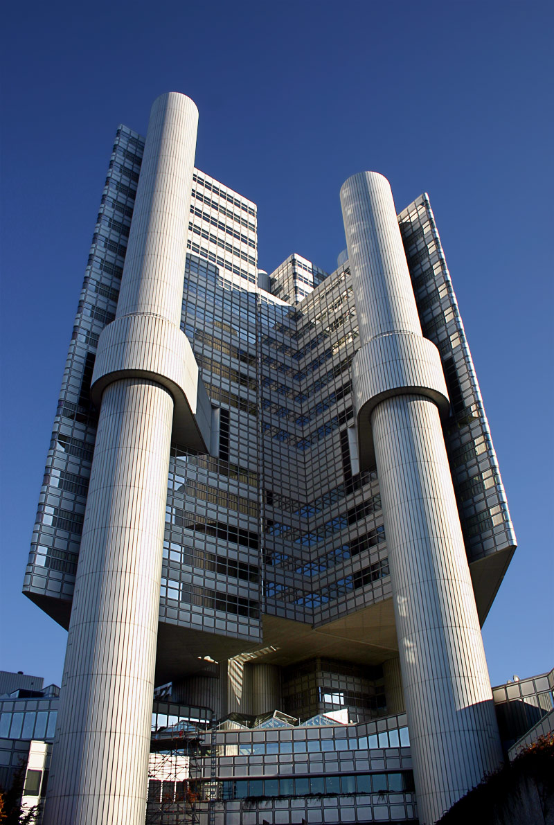 Hypo-Haus in Munich (Bavaria)